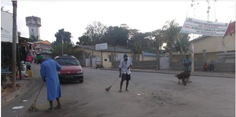 Antsohihy majihy(Ville propre)